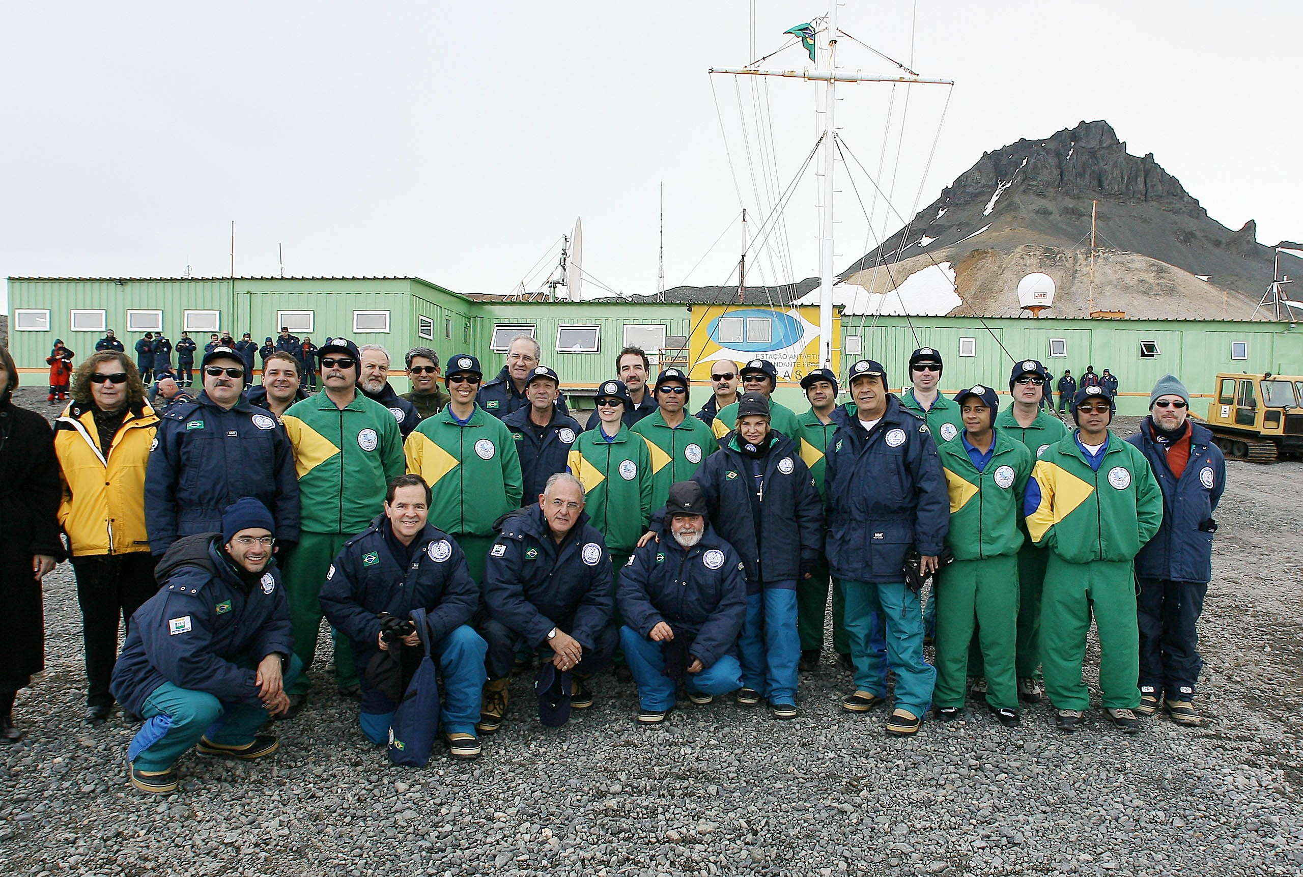 Lula na Antárdida